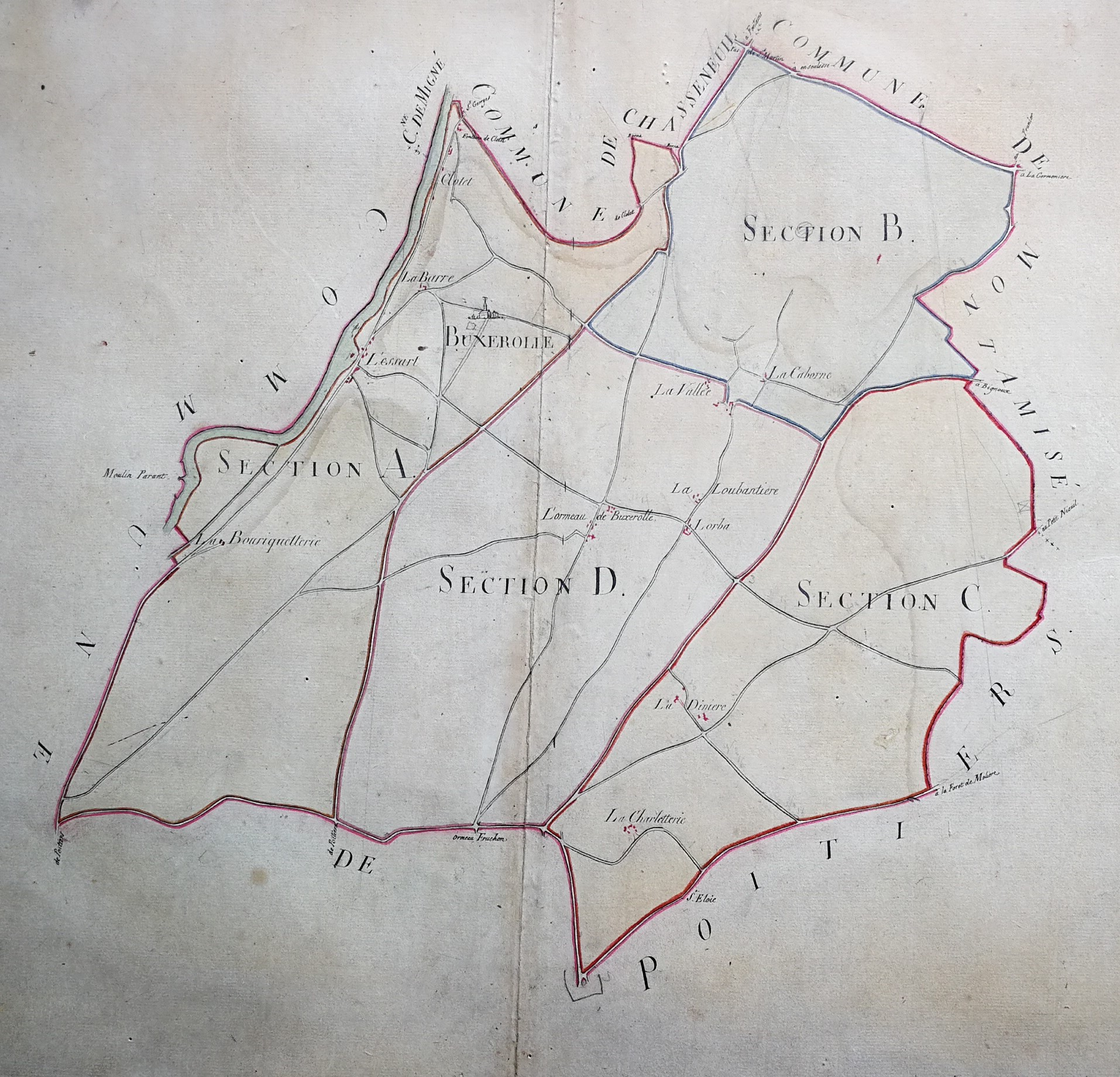 Plan tracé sous M. Mallarmé, Préfet de la Vienne (1807-1815) Source : archives municipales